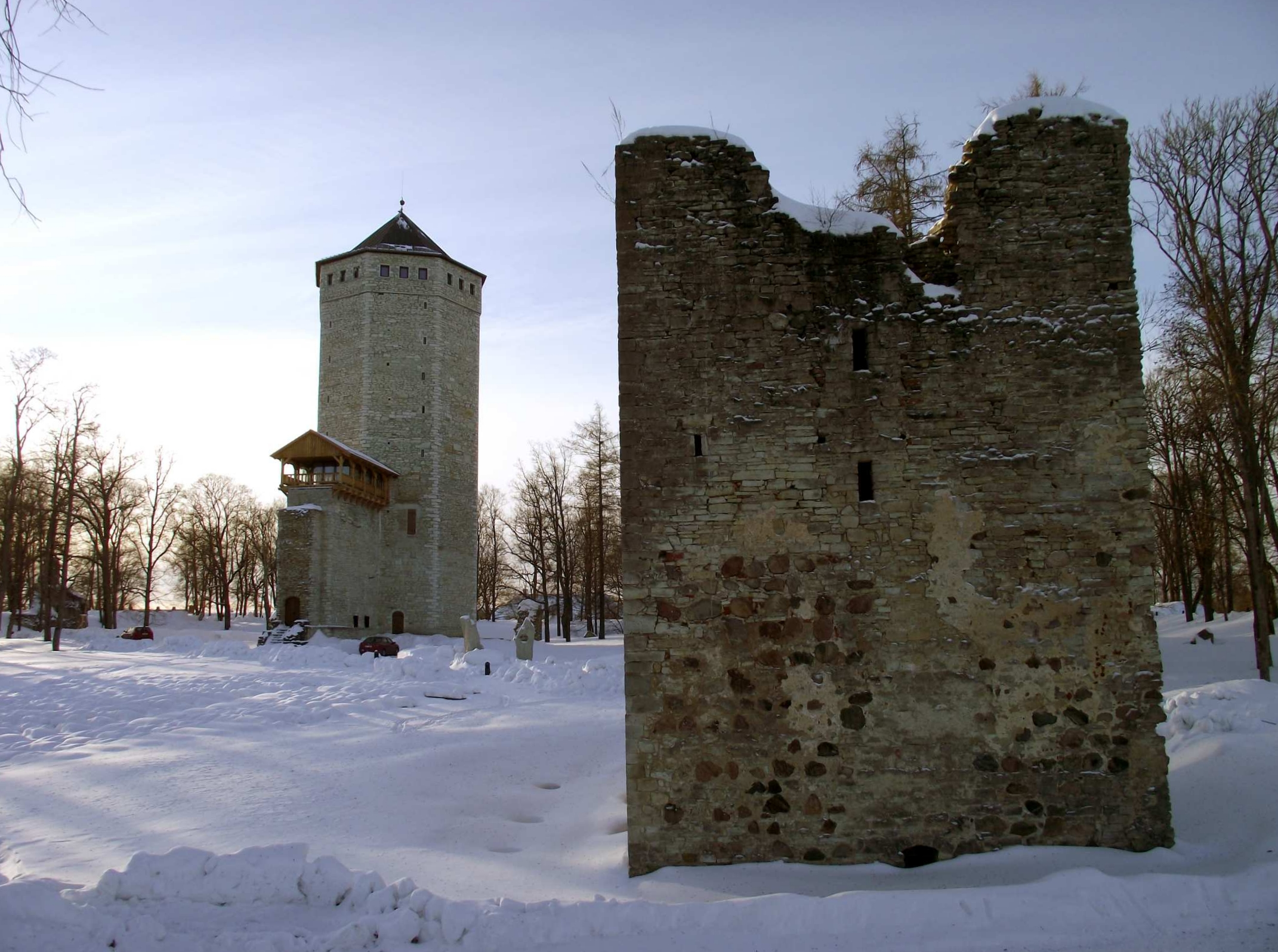 Paide ordulinnuse varemed, Paide Castle ruinas